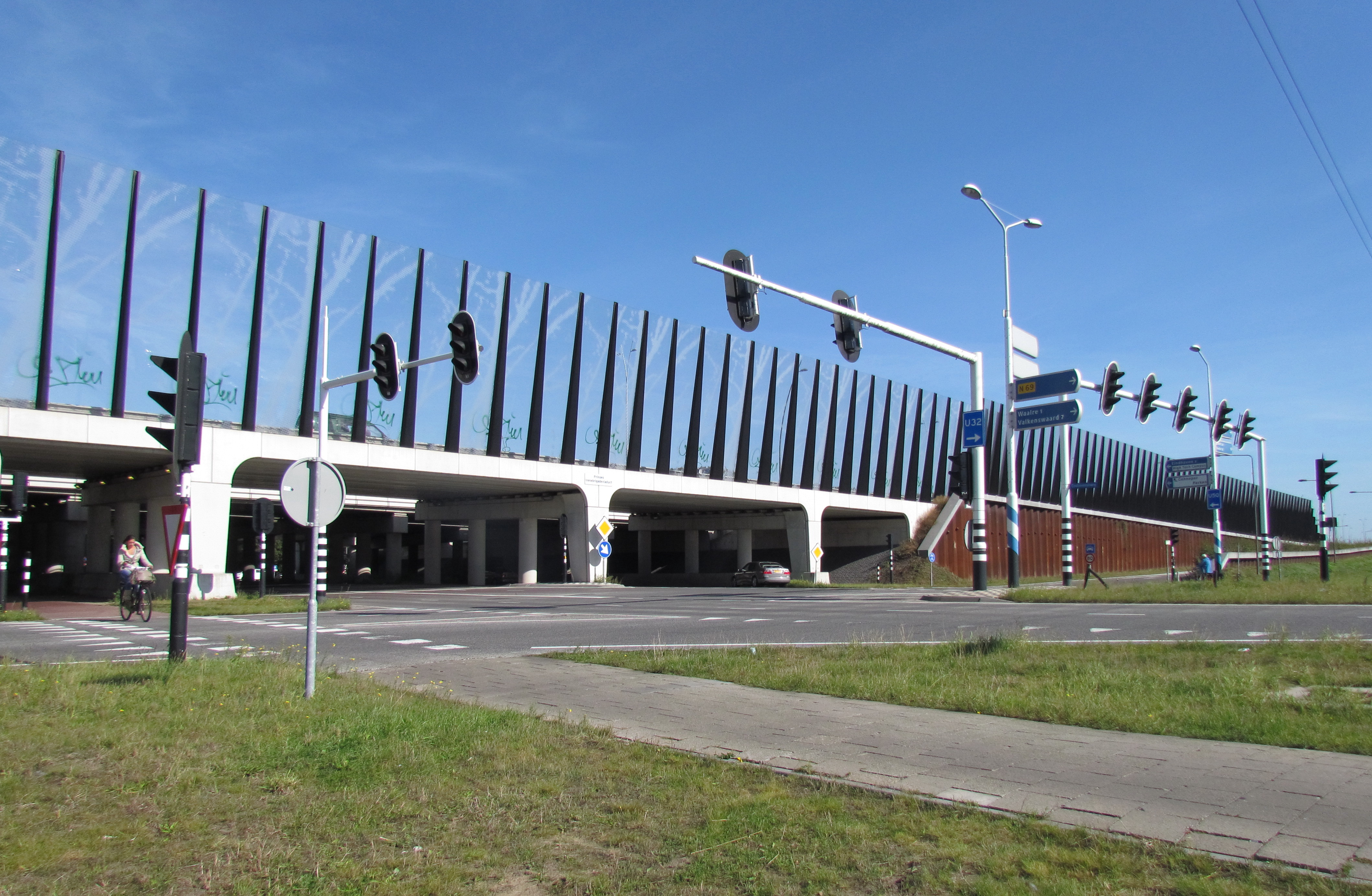 Prinses Irenebrigadeviaduct van de A67 over de N69 (Aalsterweg) tussen Eindhoven en Aalst (NL)